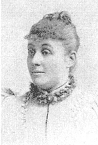 Wilhelmina Drucker, Dutch feminist, writer